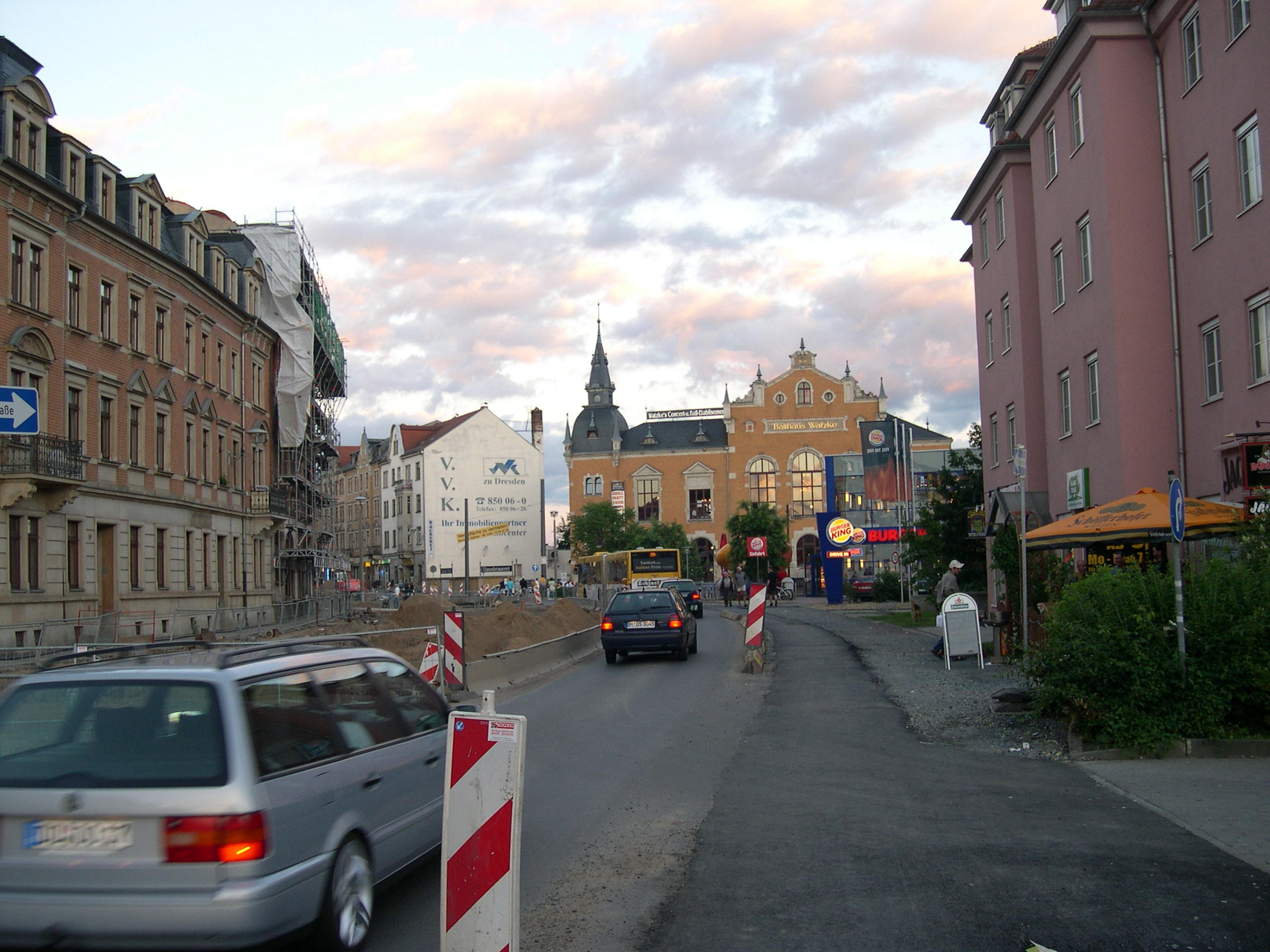 Dresden-Mickten, Ballhaus Watzke 2005, Rekonstruktion Leipziger Straße